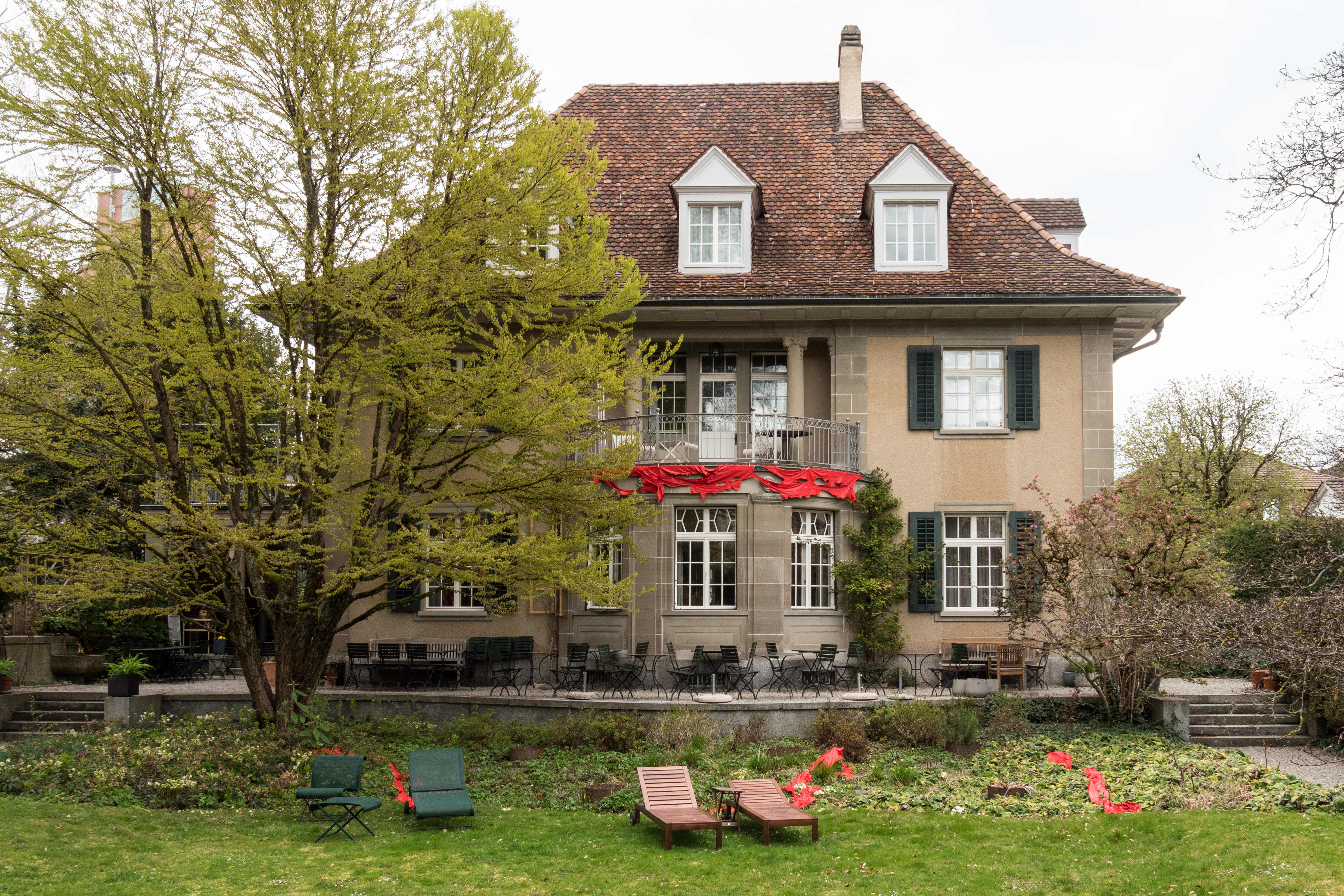 Ort für Kunst und Kultur: Villa Sträuli in Winterthur, Museumstrassse 60. Erbaut 1908 - 1911, Architekten: Völki & Bridler.